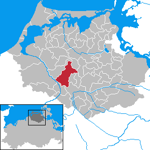 Eixen in Mecklenburg-Vorpommern - District Nordvorpommern